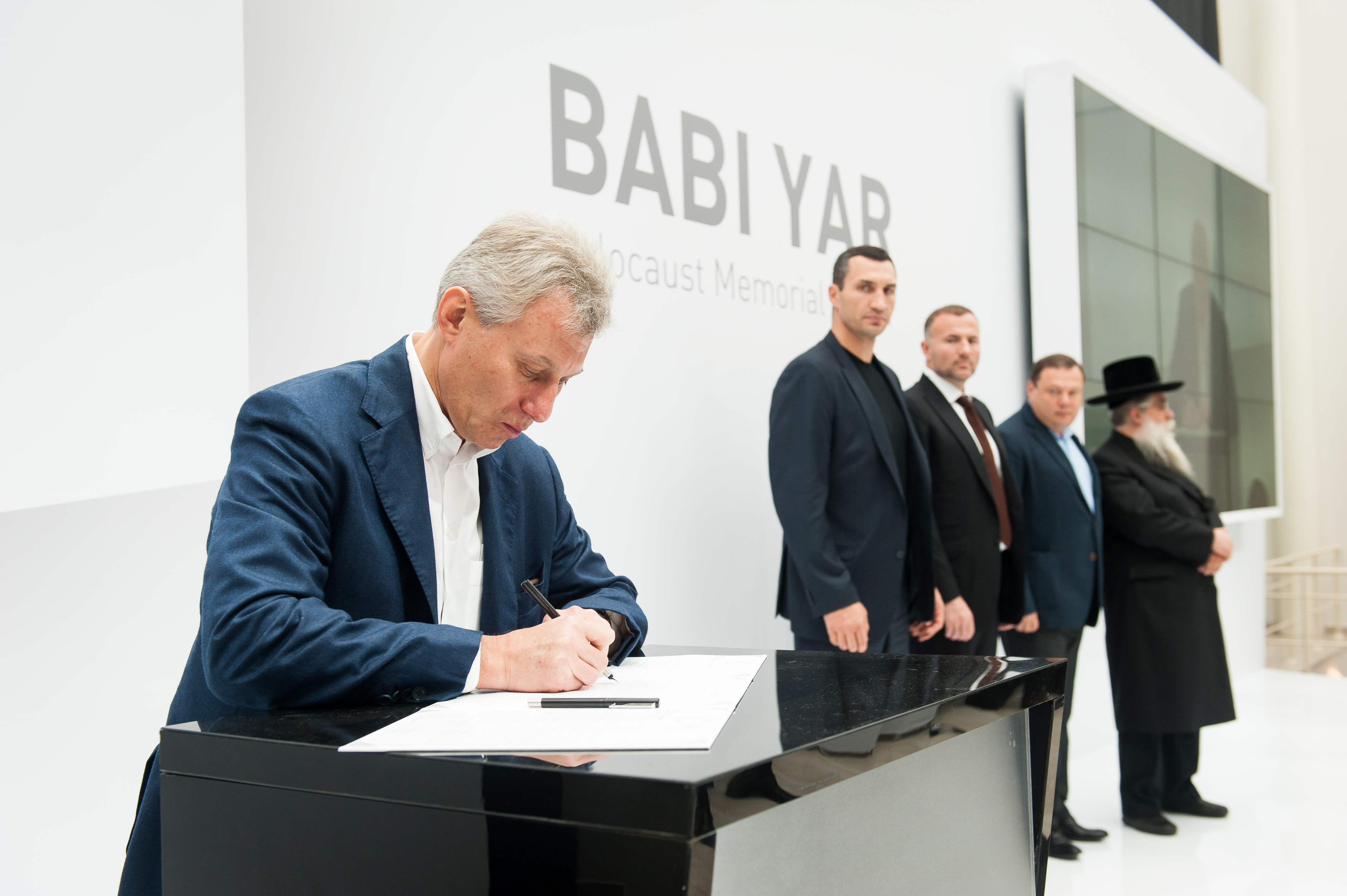 SSH_2639